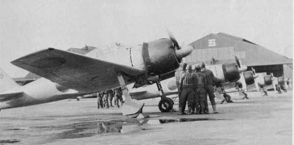 A6M3_Model32